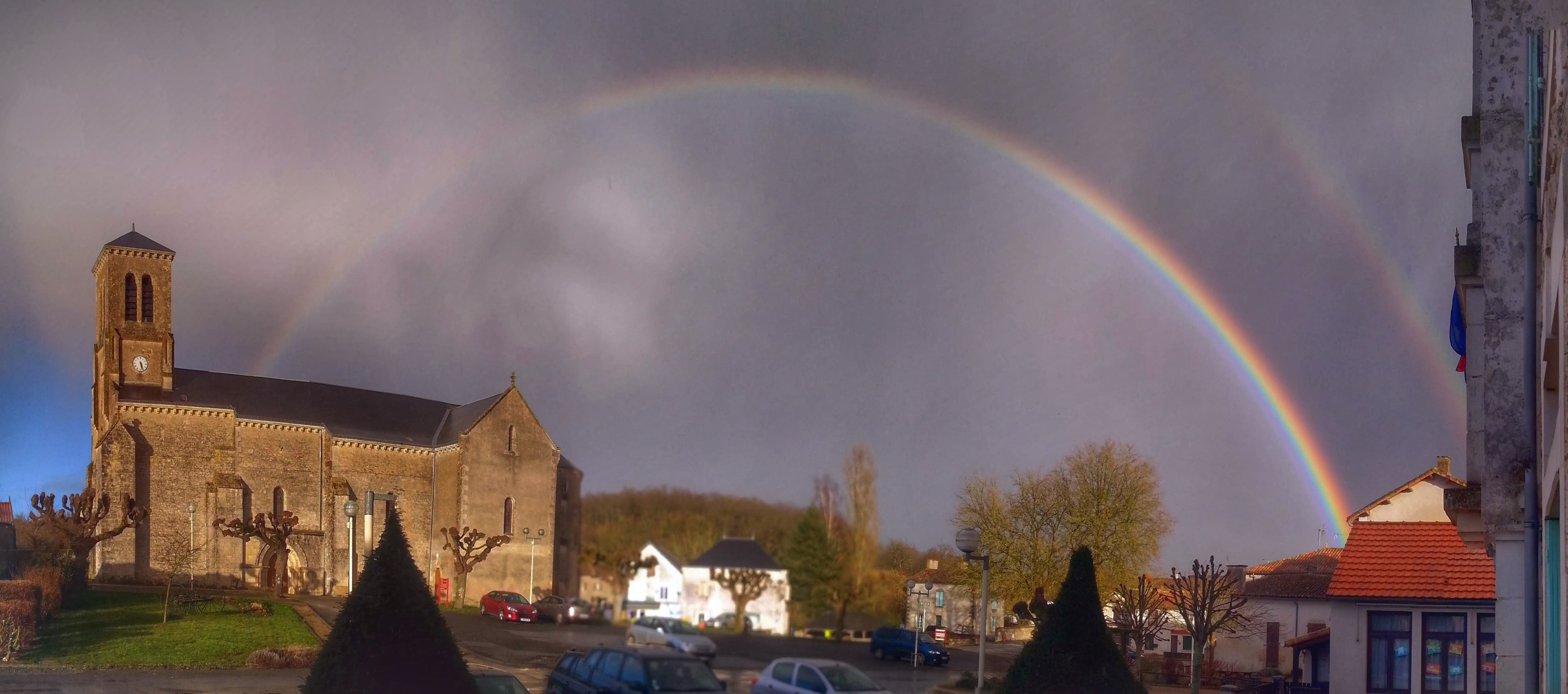 Commune de BENASSAY